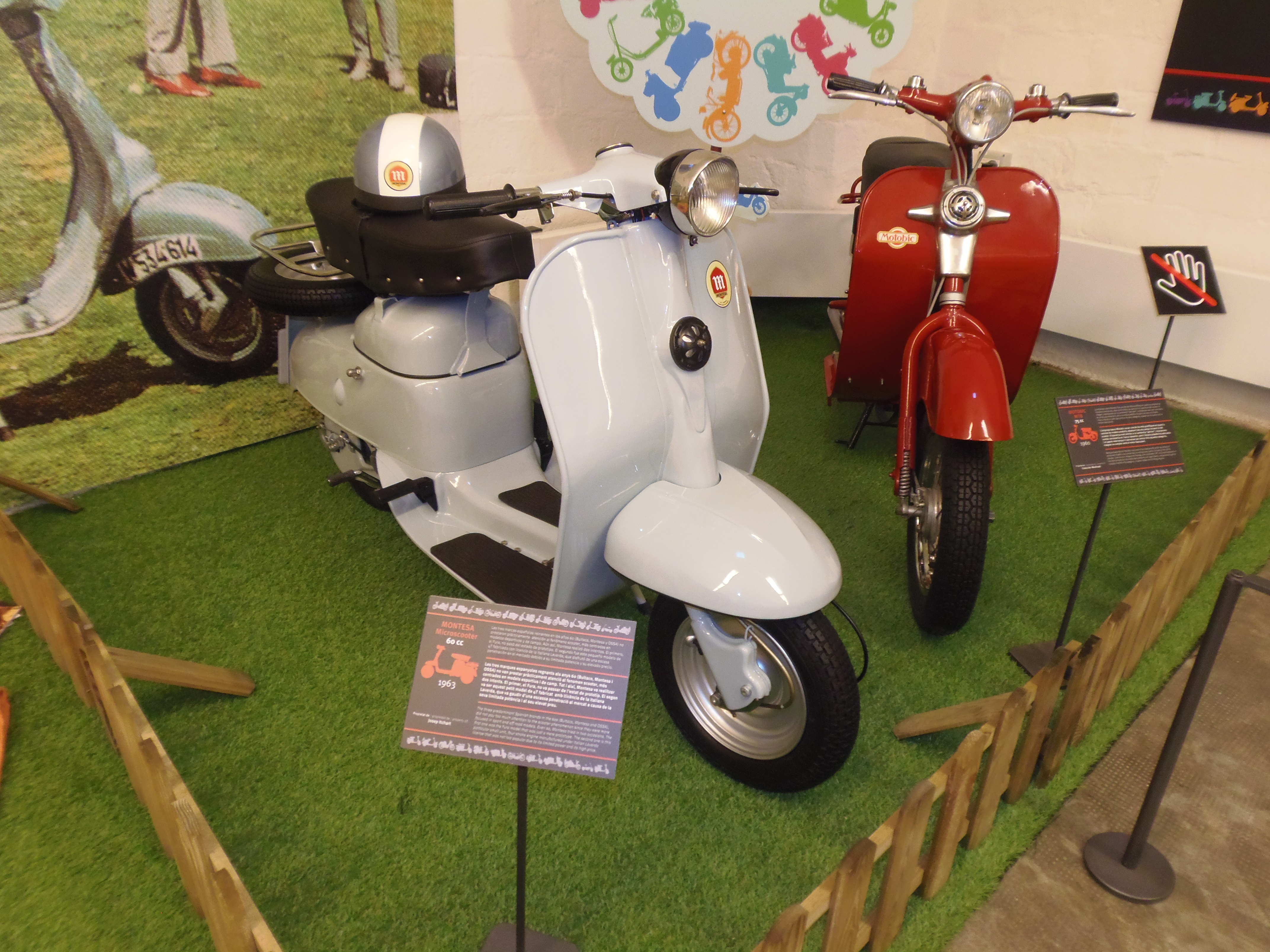 Montesa Microscooter 60 cc, 1963